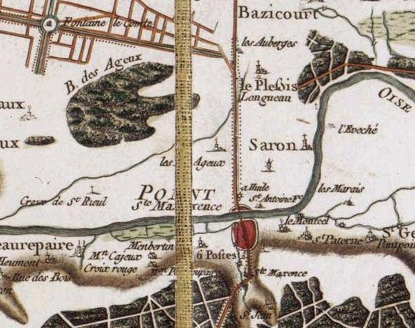 Les Ageux (60) sur la carte de Cassini.